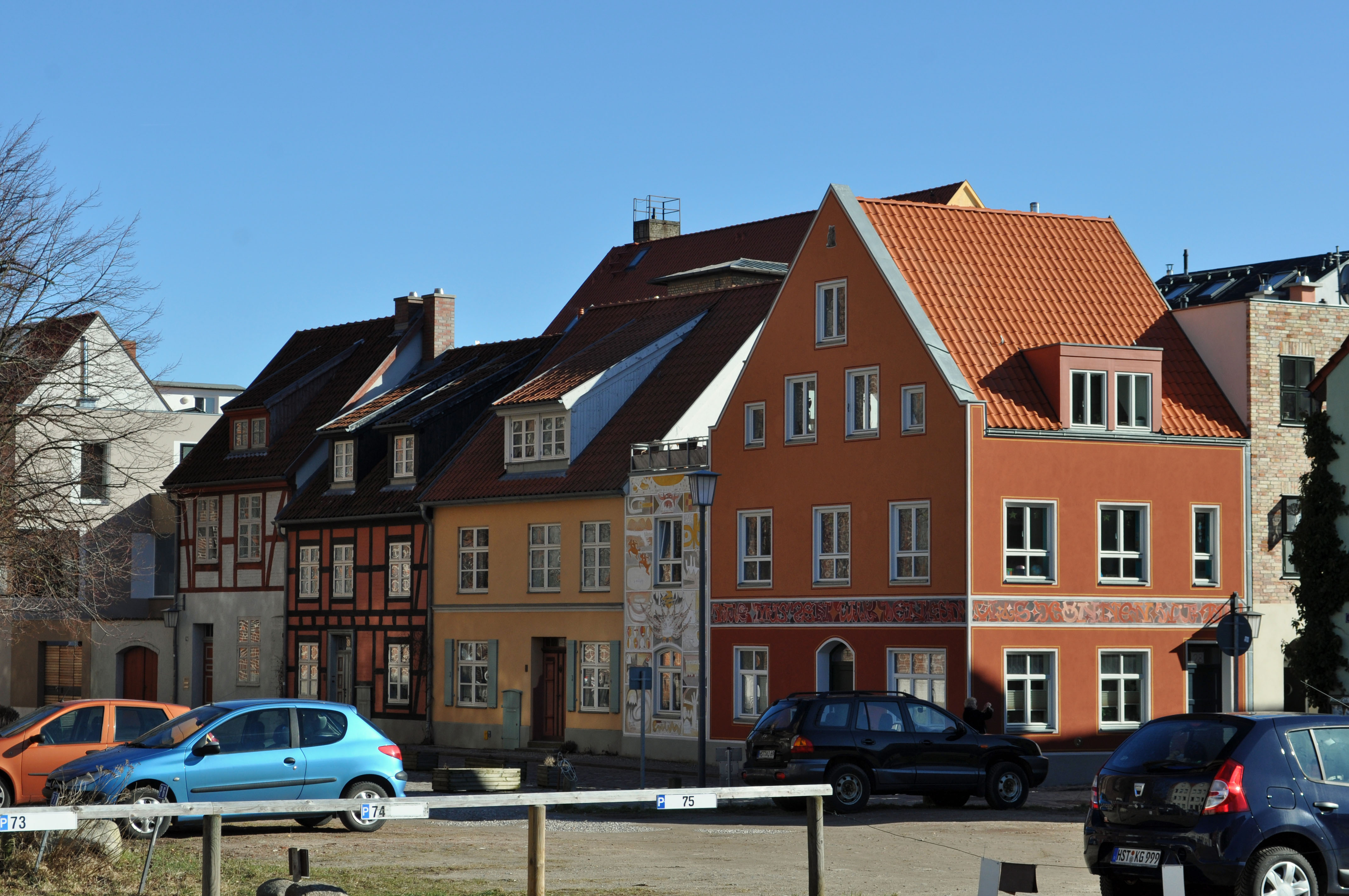 Gebäude bzw. Gebäudedetail in Stralsund. Straße und Hausnummer siehe Dateiname.